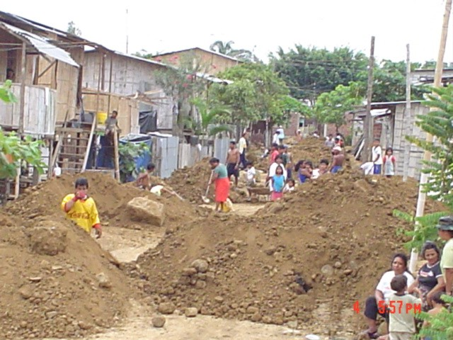 Bastión Popular, todos colaboran en el relleno de los lotes para mejorar las condiciones sanitarias de las viviendas. Lugar: Norte de Guayaquil (Barrio de Bastión Popular) Autor: Programa ZUMAR Fecha: 2004